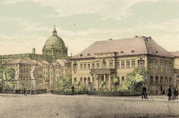 Die alte Kommandantur in Berlin, um 1860. Erbaut 1795/96 von Conrad Friedrich Wilhelm Titel. Farblithografie.